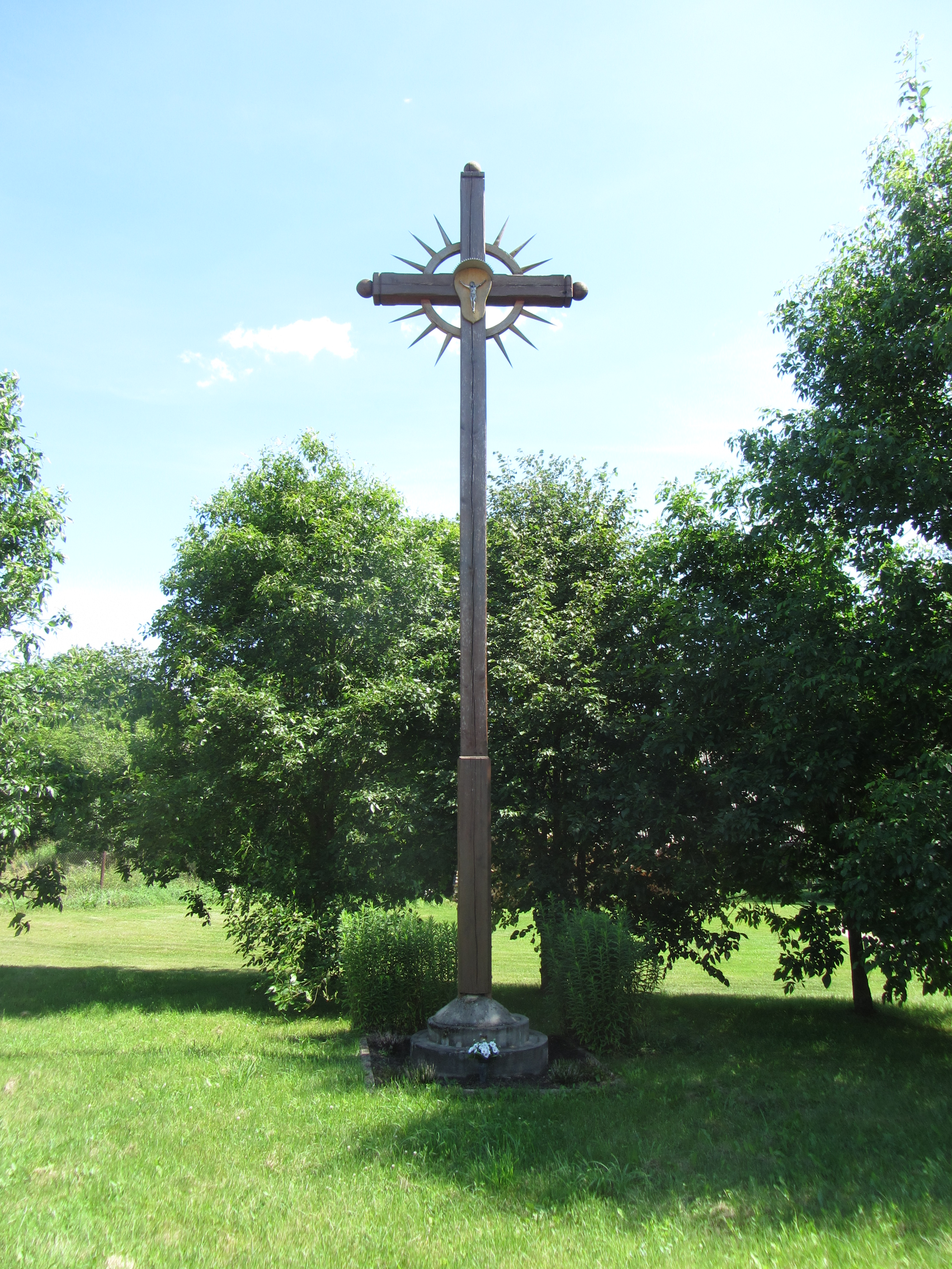 Matuizos, Lithuania